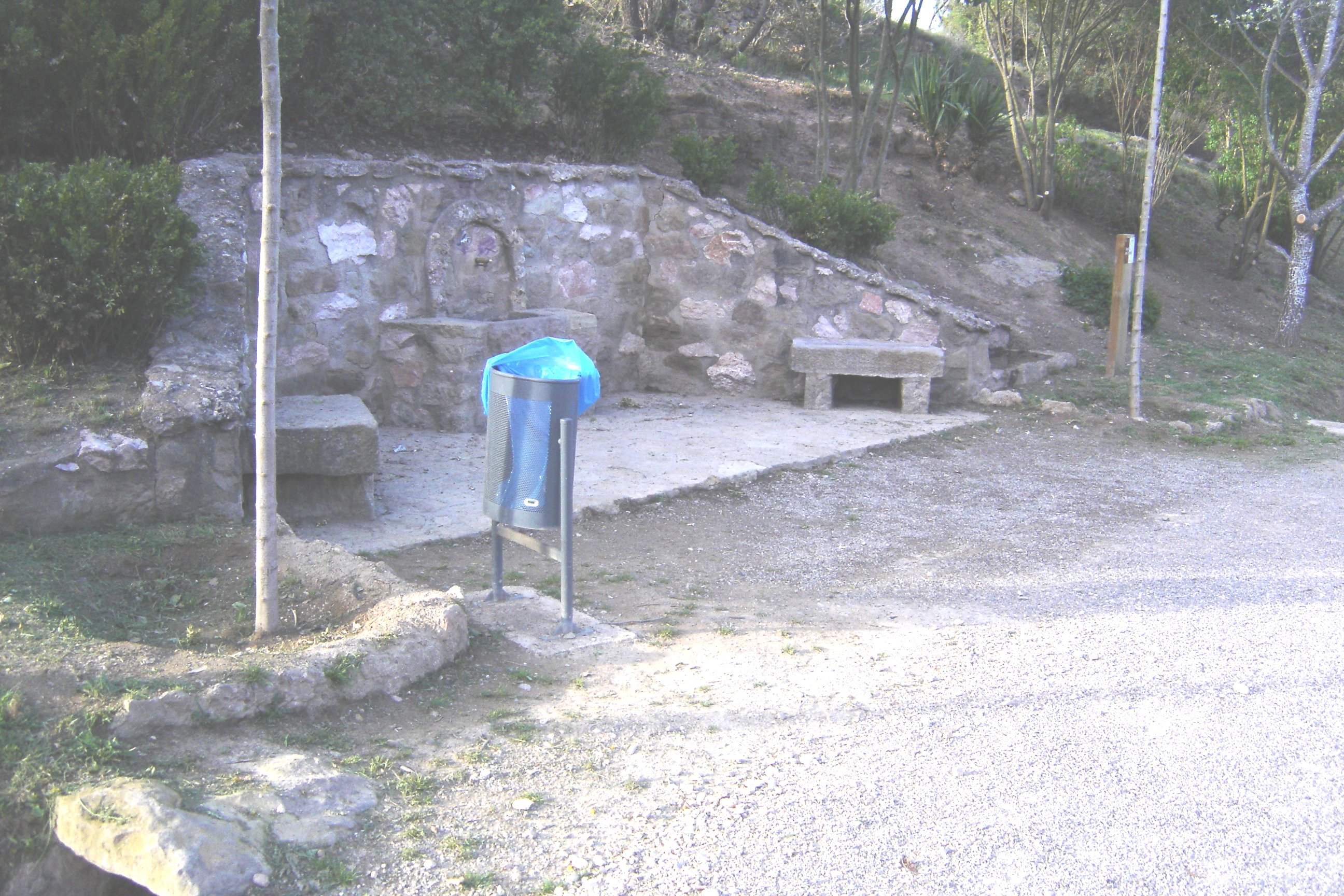 La font de l'Ocell, al municipi de Solsona (Solsonès). Vista general de la font de del sud-oest.